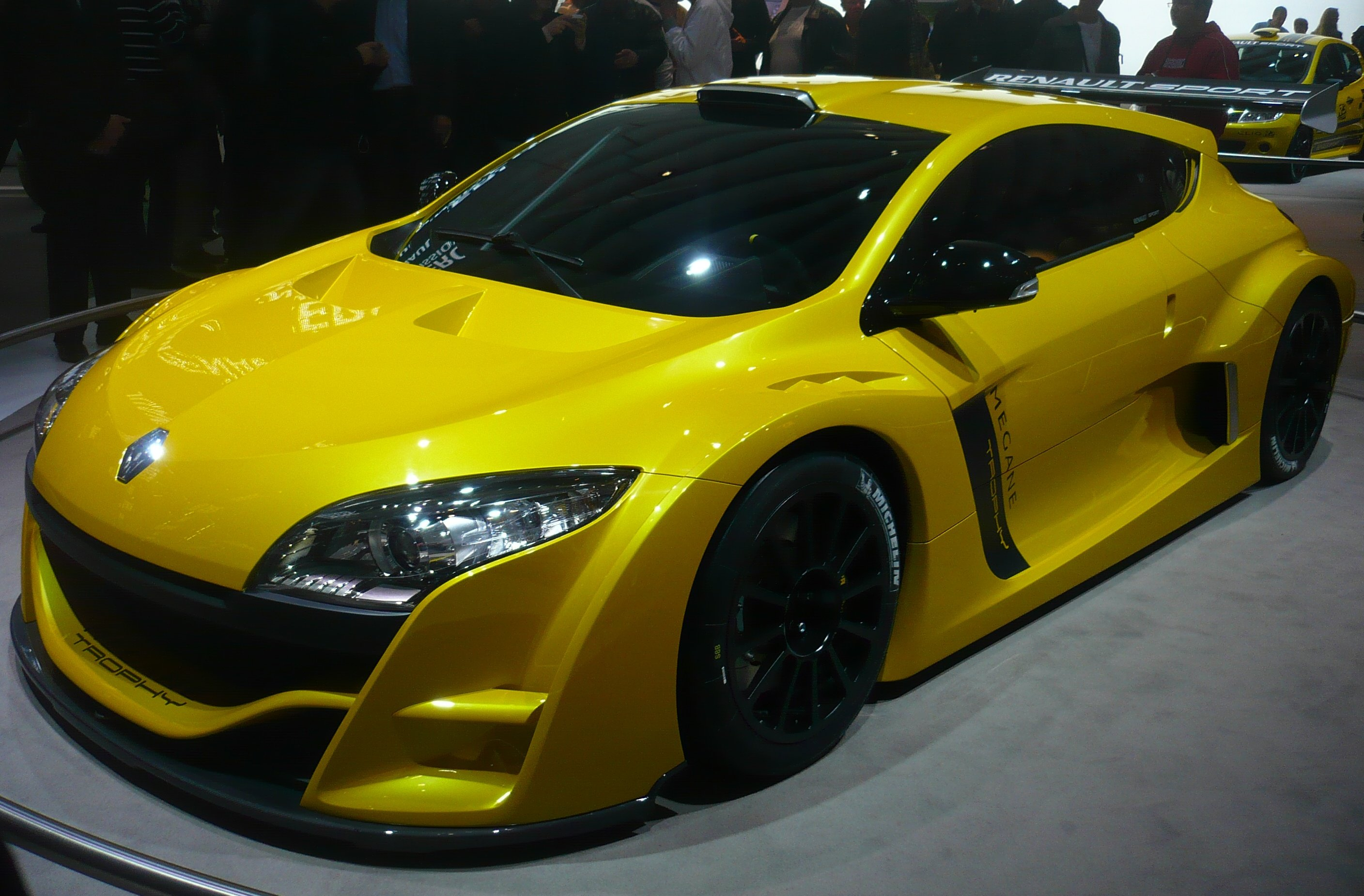 Renault Sport Mégane Trophy.